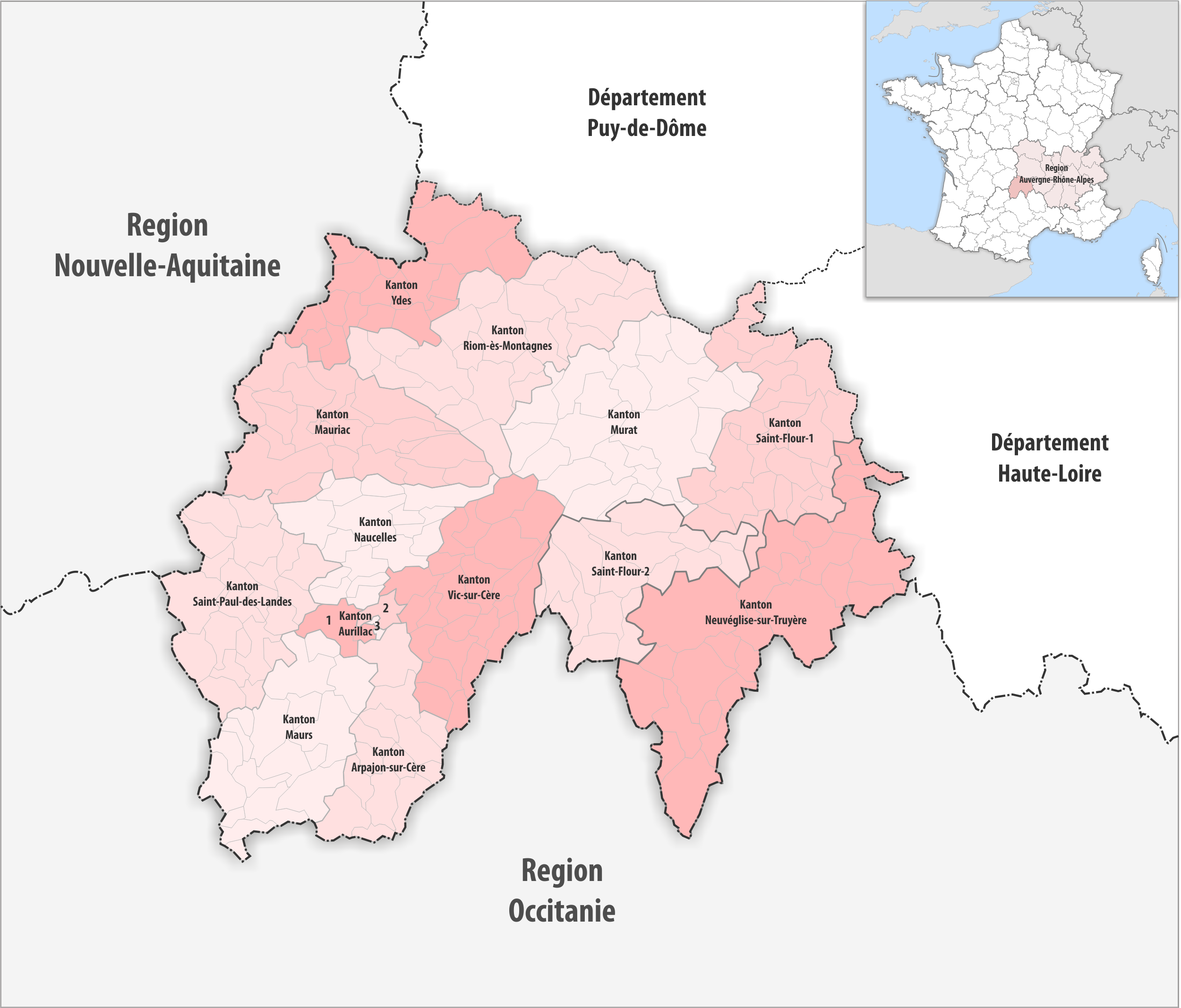 Gemeinden und Kantone im Departement Cantal